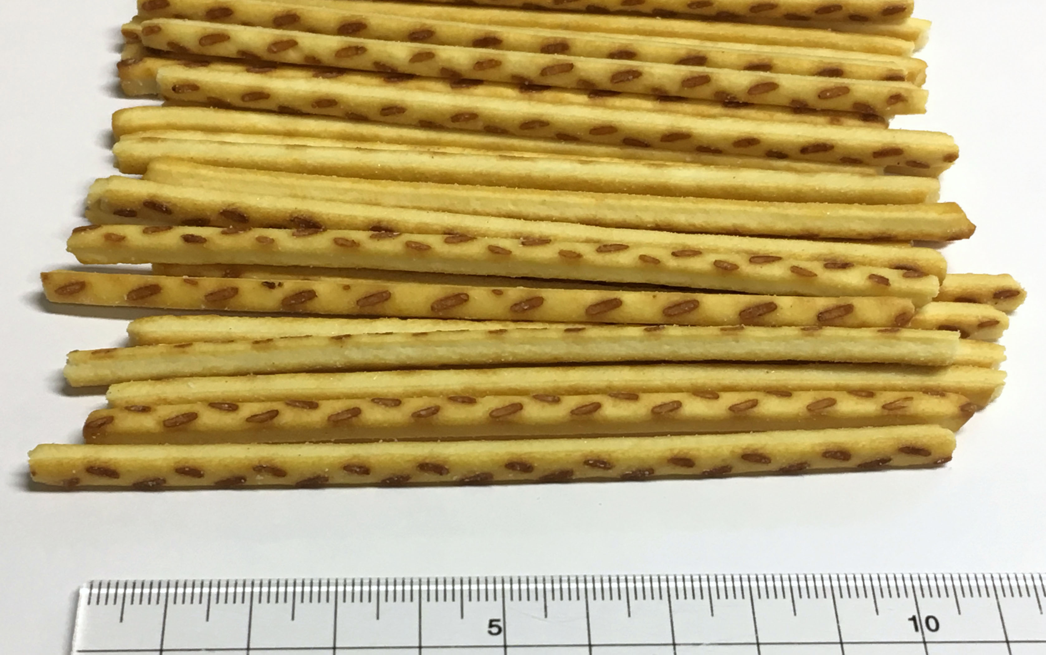 江崎グリコのプリッツ。定規はセンチ尺。